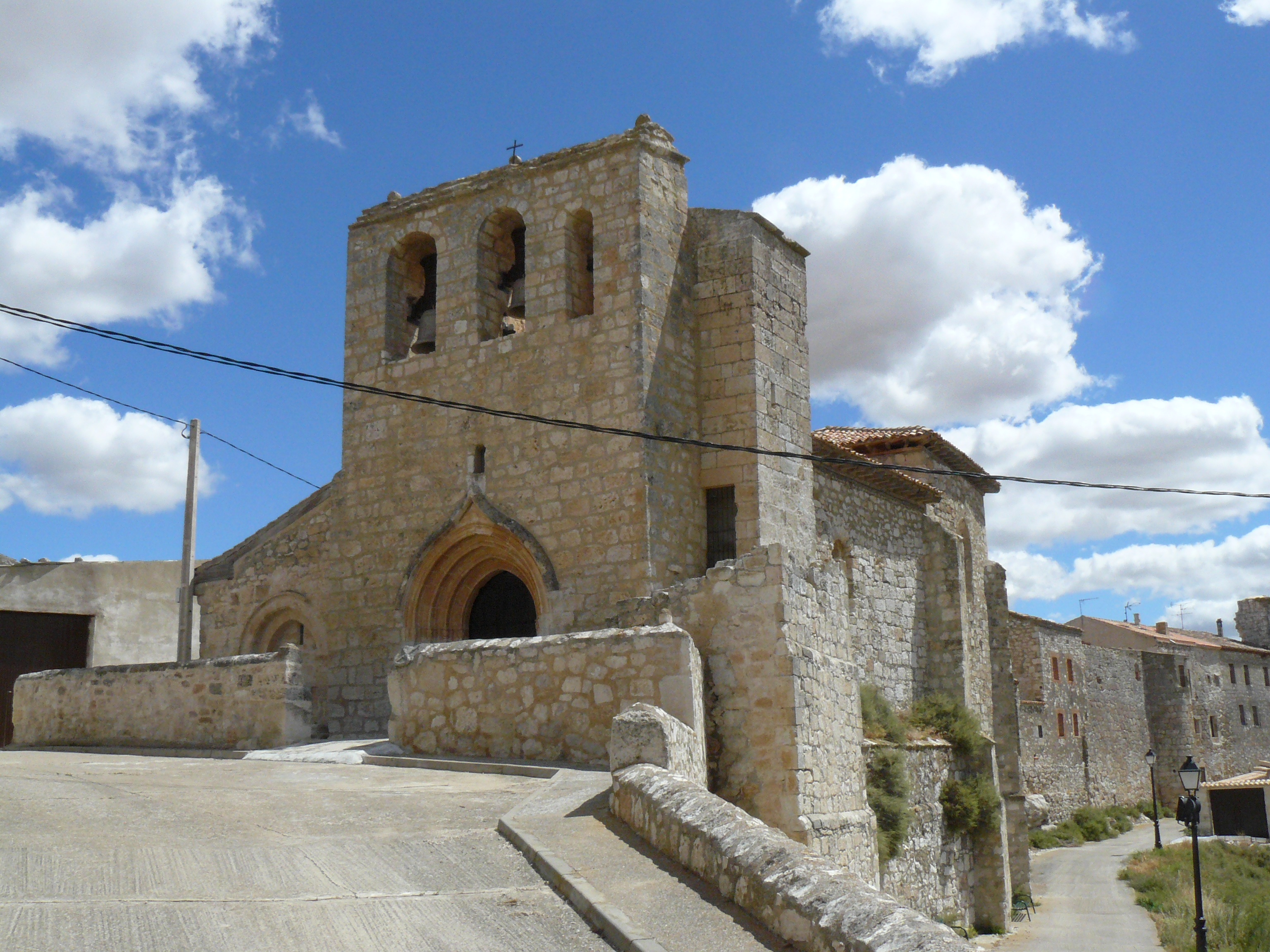 Haza (Burgos).